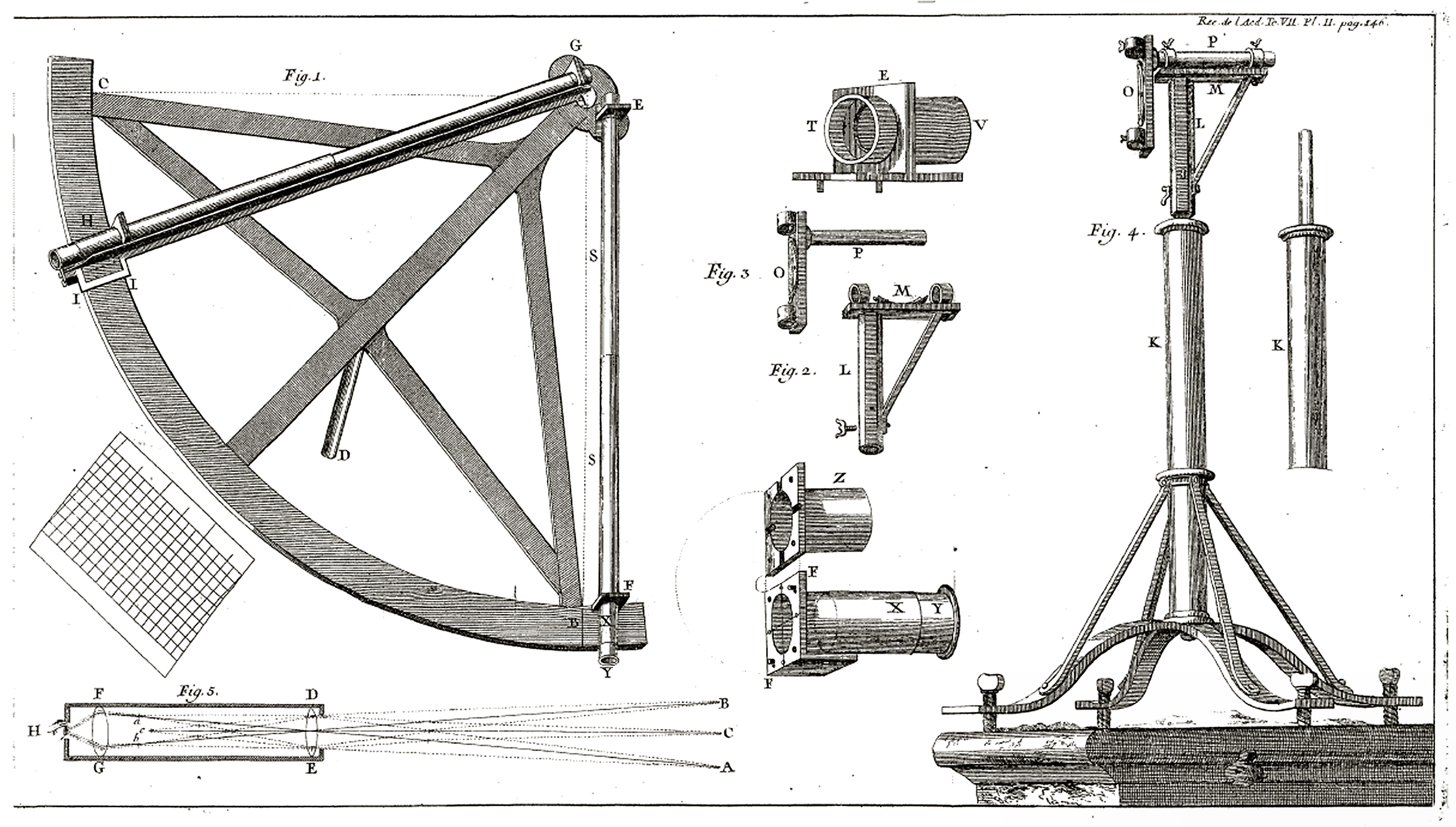 Quart de cercle de Picard à deux lunettes, deuxième édition.